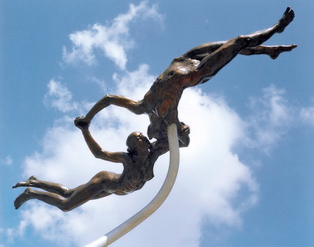 Spanje monument - 1984-86 - 7meter hoog - Amsterdam